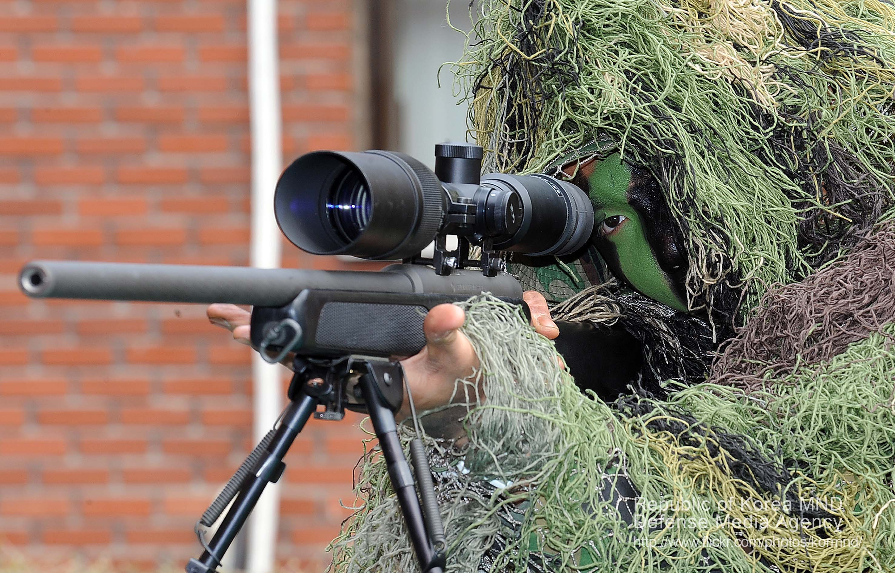 2011 국방화보 Rep. of Korea, Defense Photo Magazine 육군수도방위사령부가 ‘도시지역 작전 간 저격수 운용방안’ 전술토의 에서 위장복을 선보이고 있다.